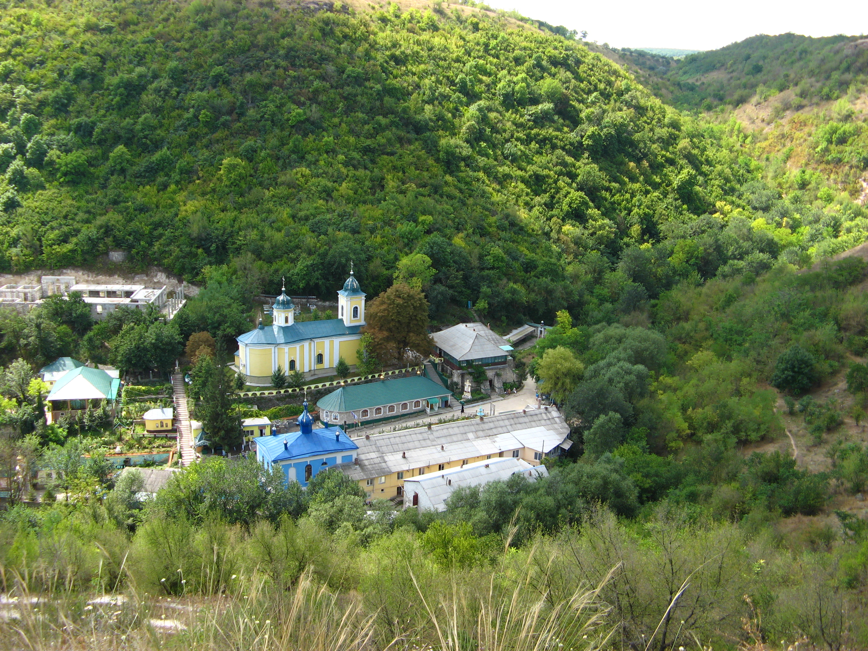 Mănăstirea Saharna (vedere de la Talpa Maicii Domnului).